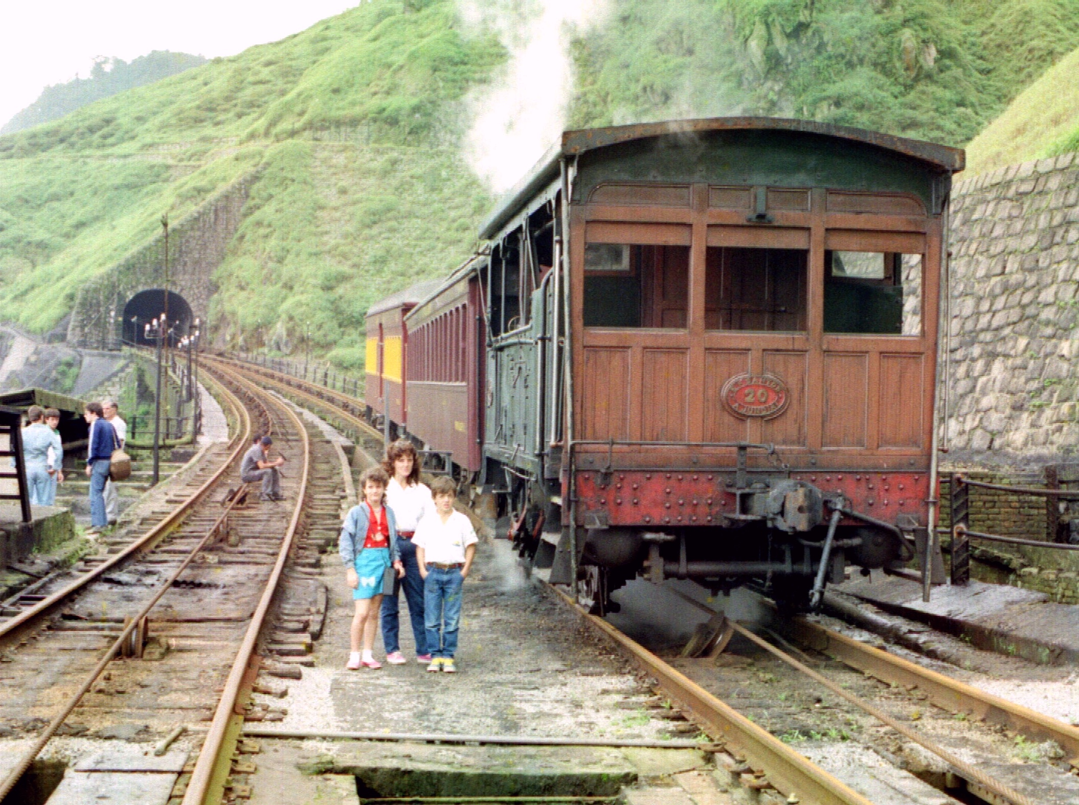 Paranapiacaba - Santo André - SP - Brasil. Locobreque funcionando para turistas. Foto de Paulo Carmona Sanches Neto - 1987